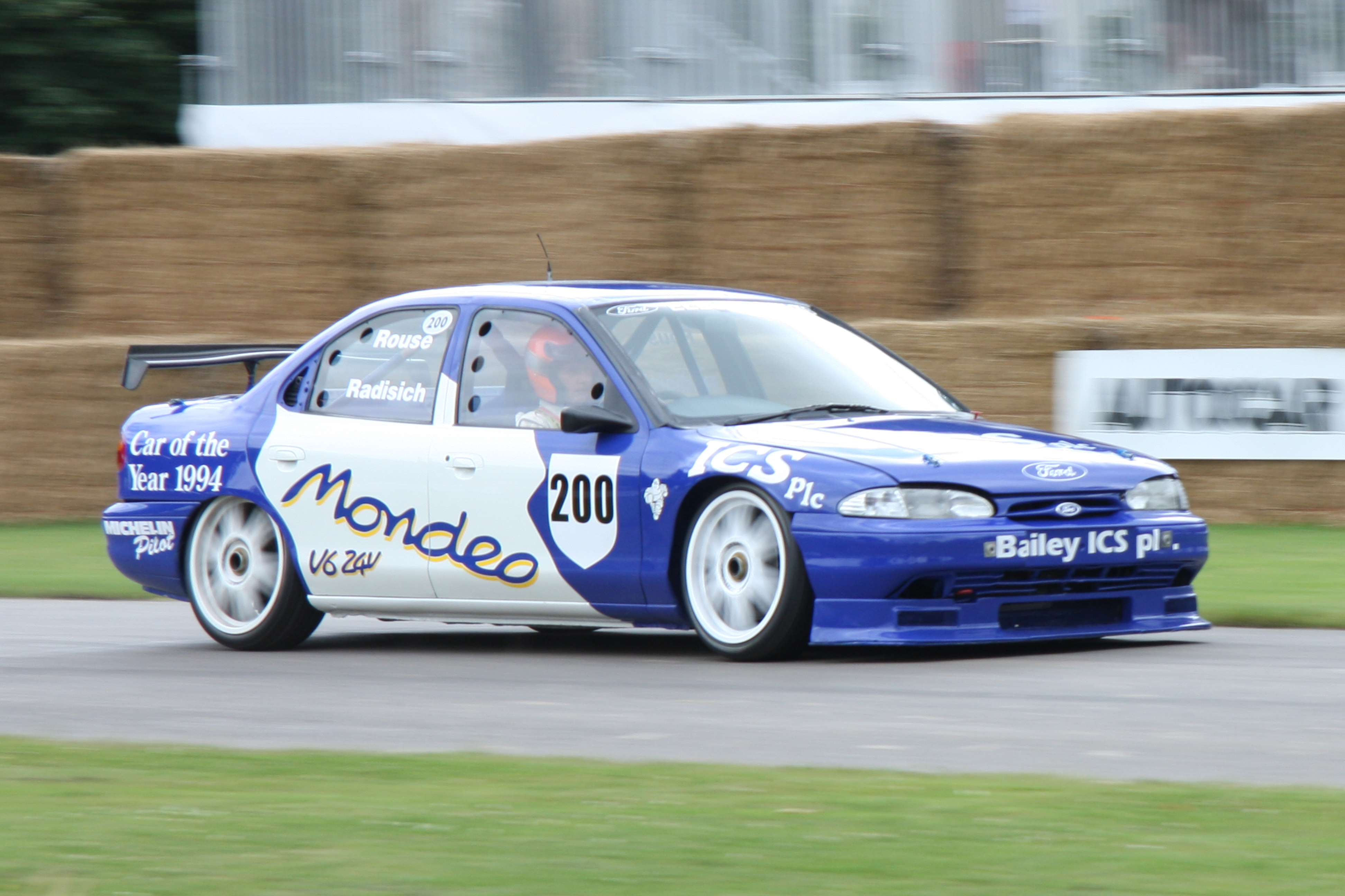 Built 1993. 2 litre 4 cylinder